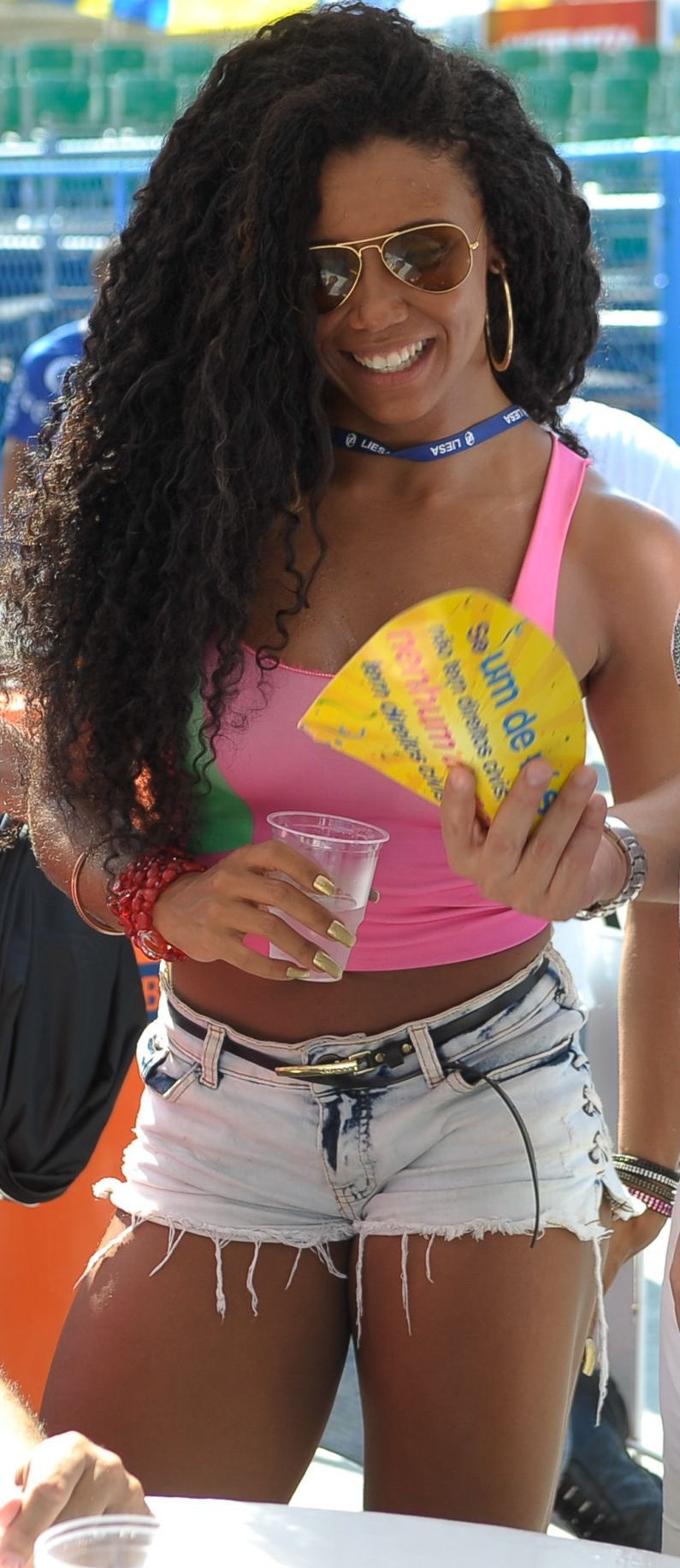 Evelyn Bastos, rainha de bateria da Mangueira na apuração do carnaval carioca de 2016.